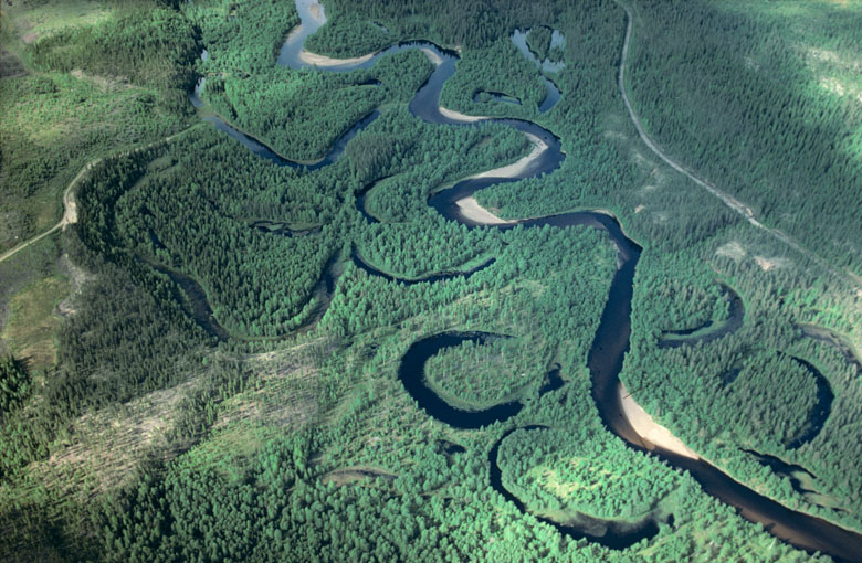 Öre älv. Troligen 70-tal